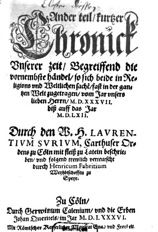 Weihbischof Heinrich Fabricius, Speyer, Buchtitel 1586